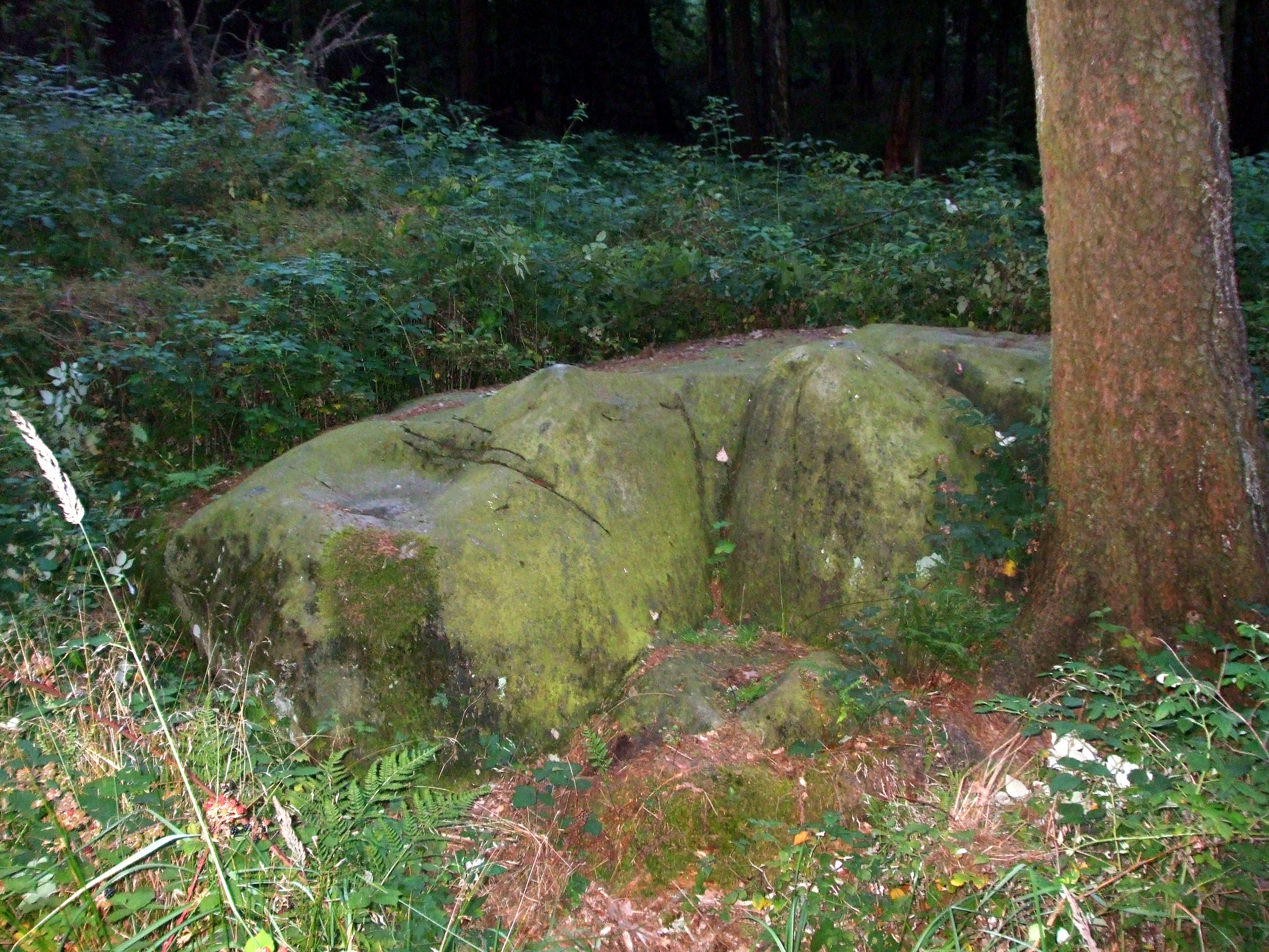 Bild zeigt den Opferstein 2, den sogenannten Schalenstein, im Leistruper Wald bei Detmold.